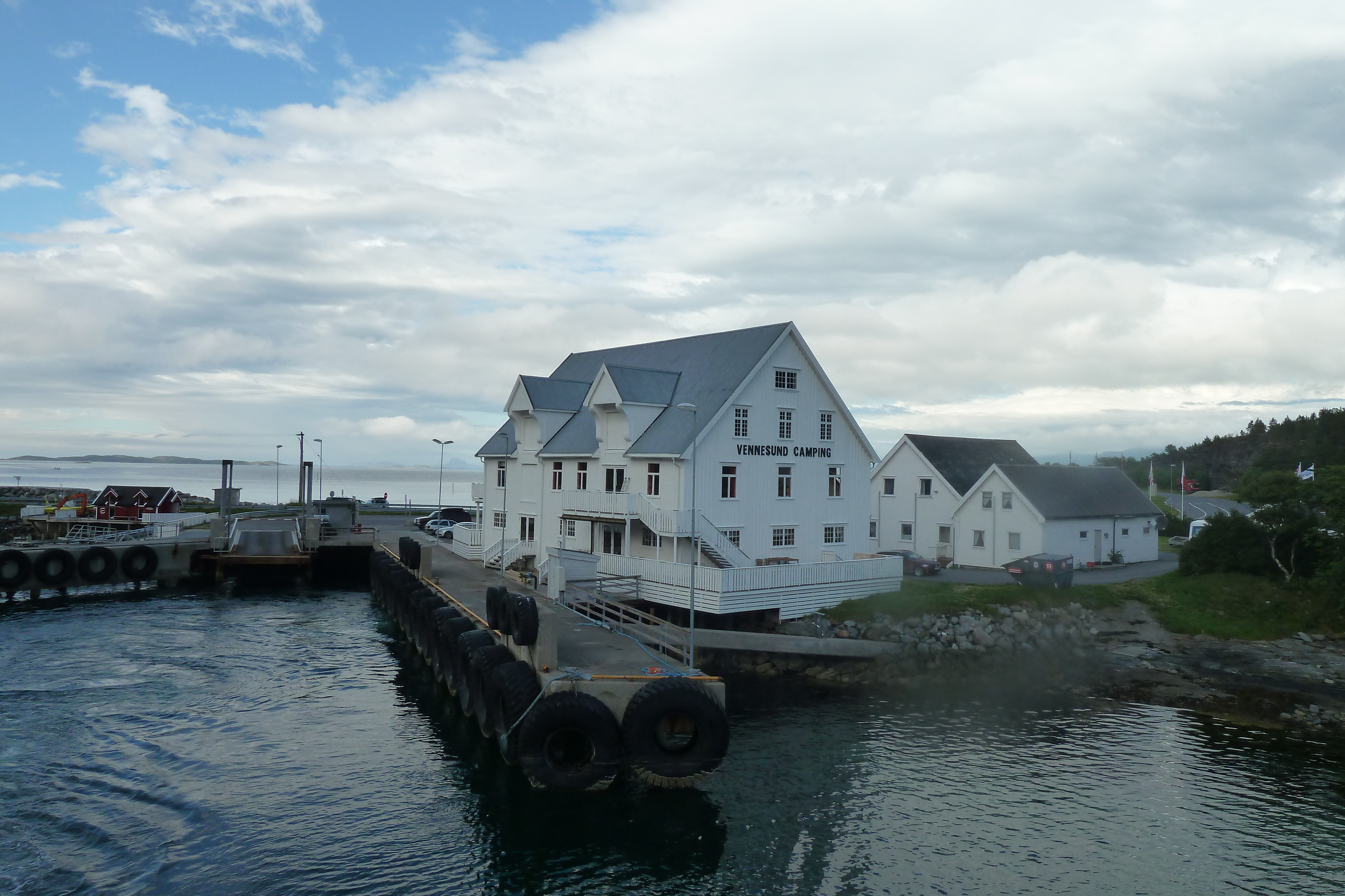 Vennesund i Sømna.